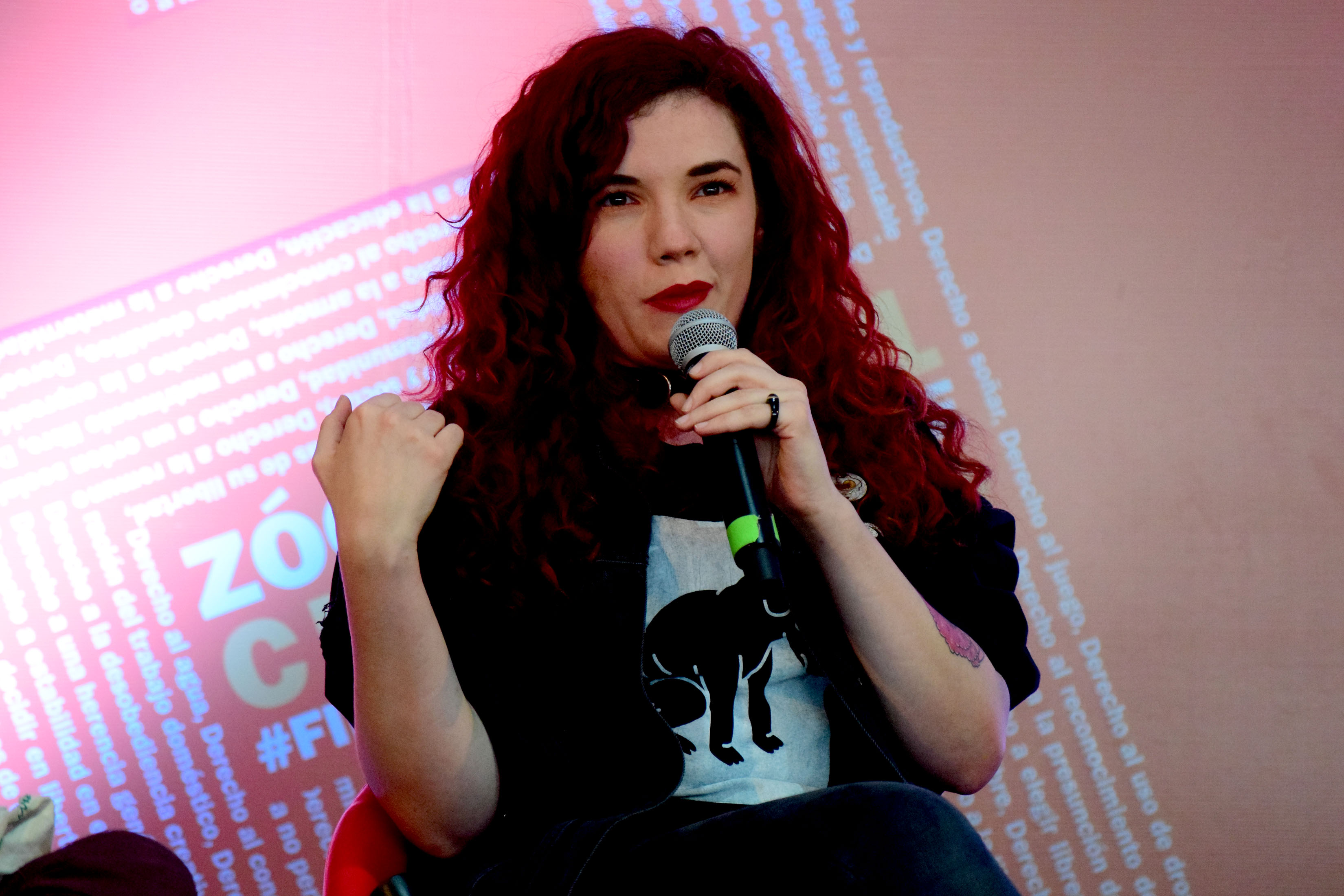 XVIII Feria Internacional del Libro en el Zócalo de la Ciudad de México, se realizó la charla "Cuando las feministas tomamos las redes sociales" con Tamara de Anda "plaqueta", Lulú Barrera, moderó: Irma Gallo.